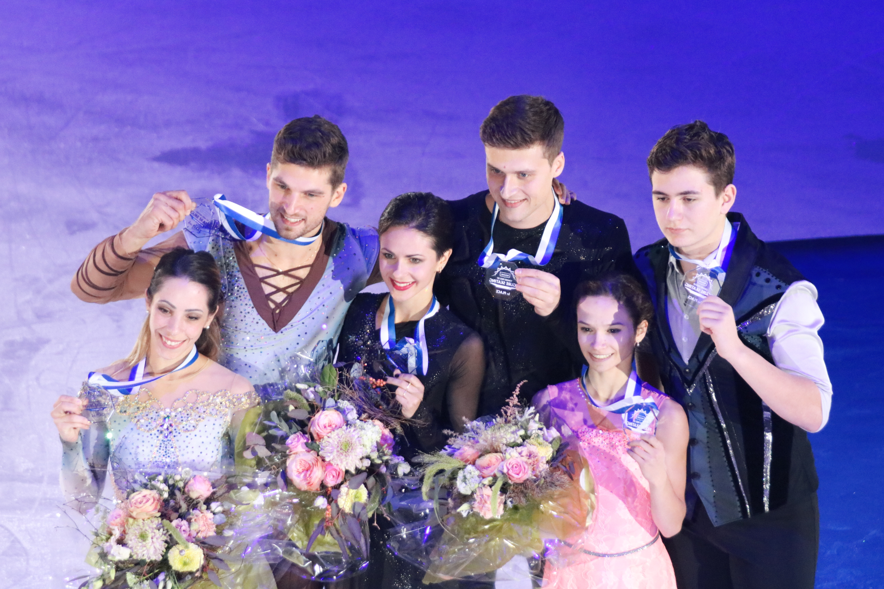 Церемония награждения в парном катании на Гран-при Хельсинки 2018.